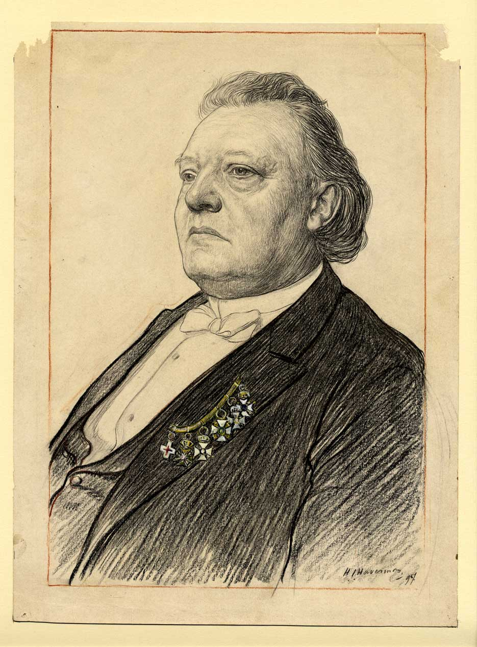 M.A. Perk (1834-1916)